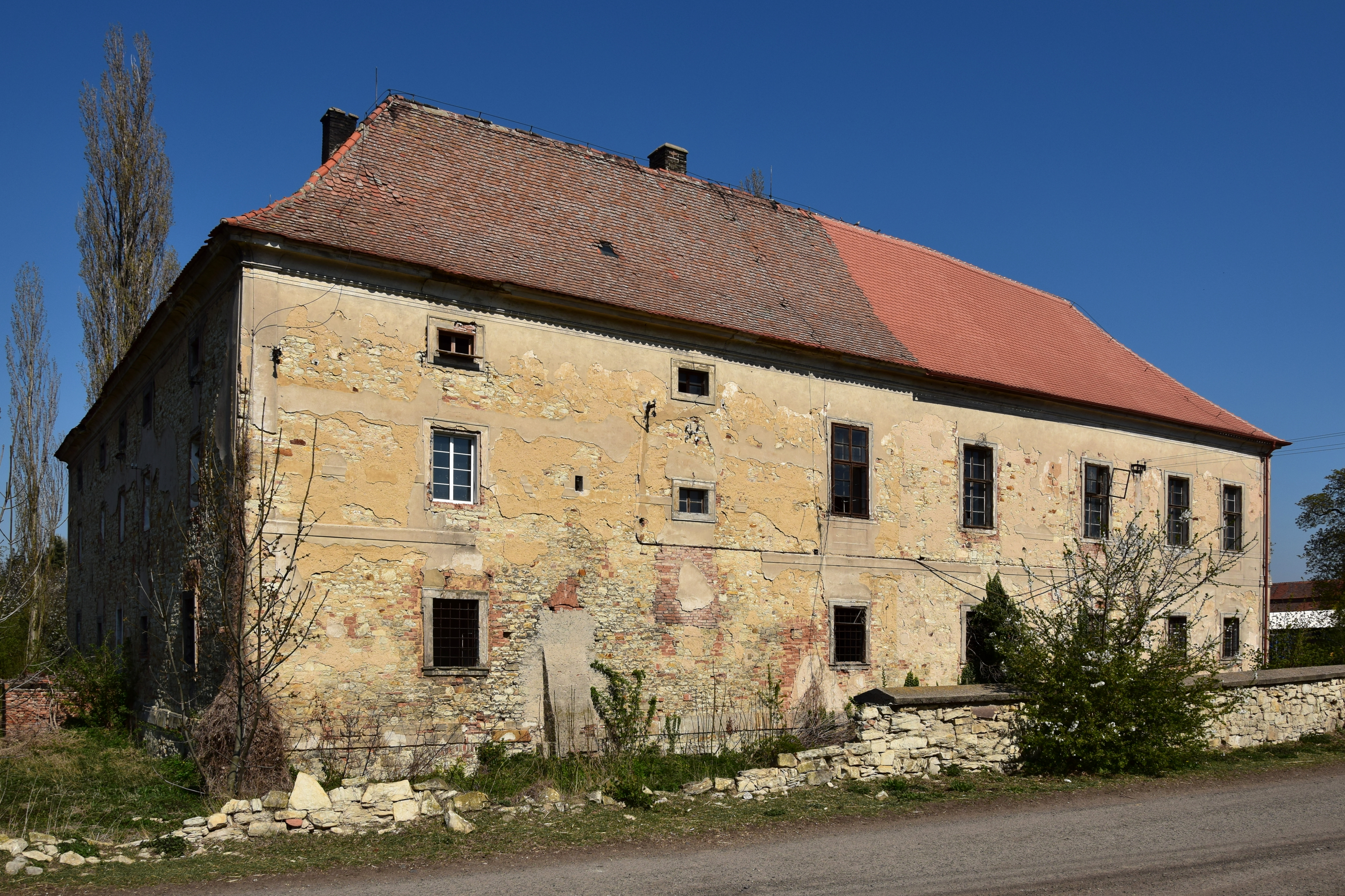 Toužetín – jihovýchodní průčelí zámku